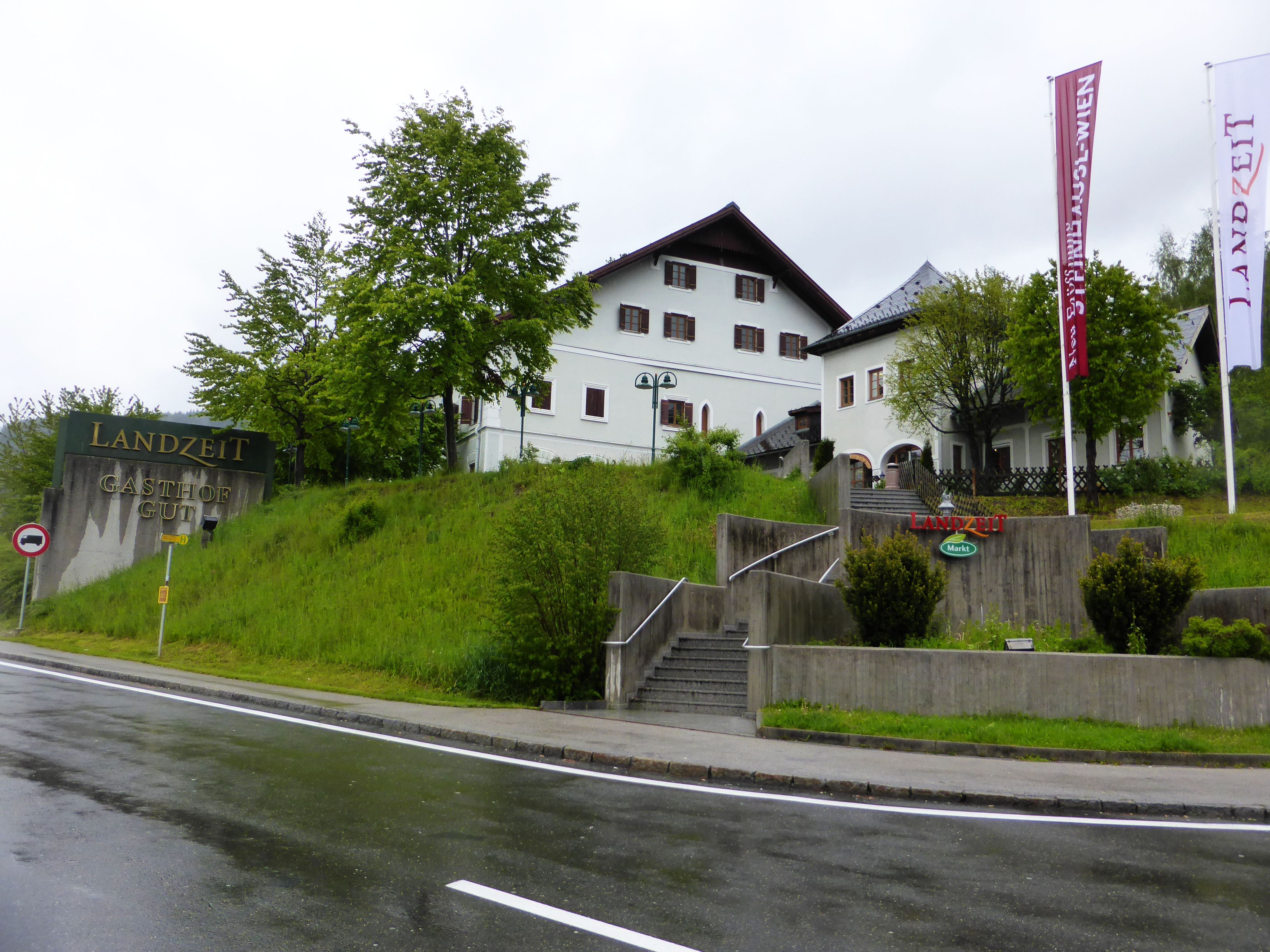 Ehem. Bauernhof, Gasthofgut; Raststation